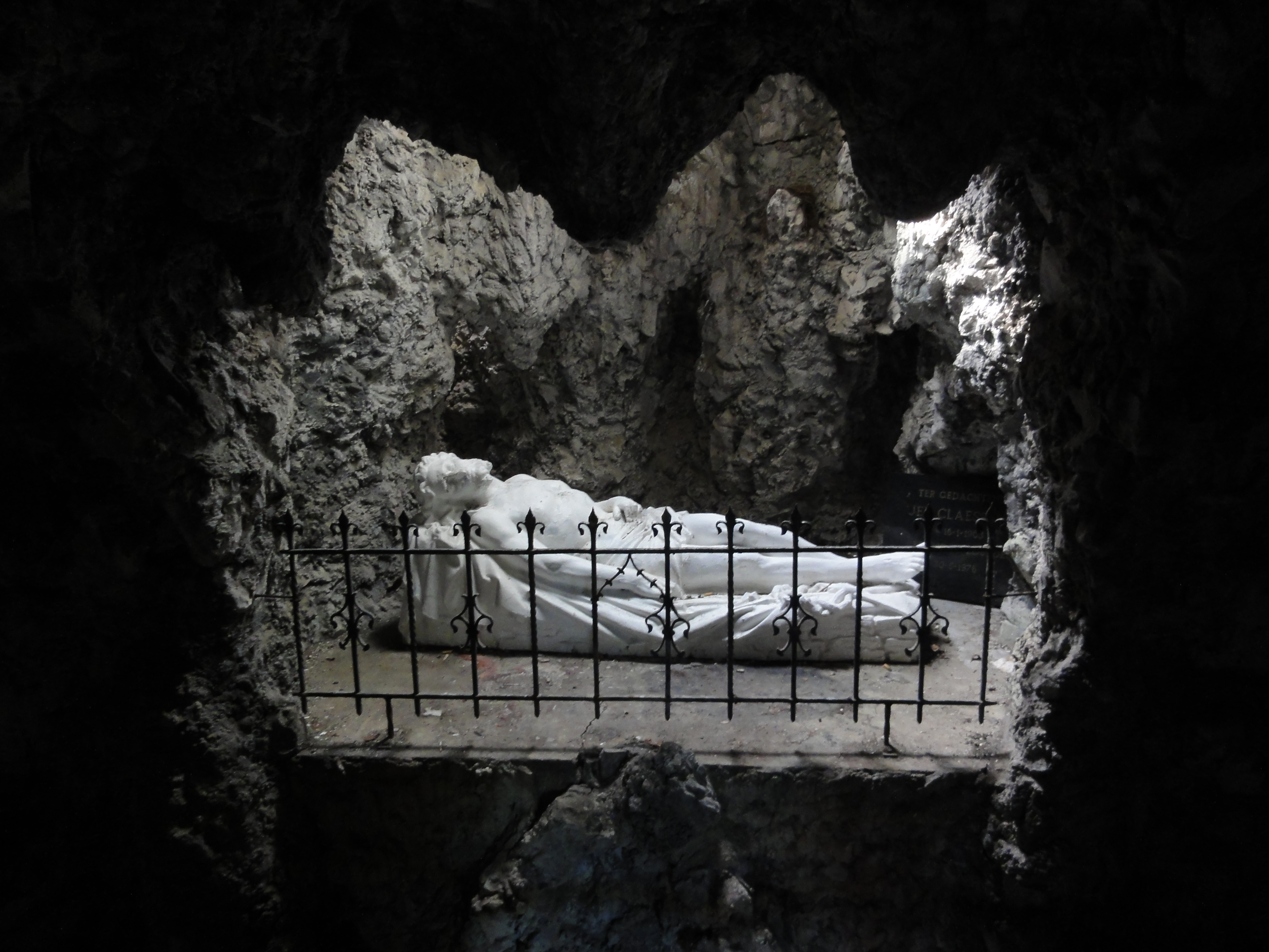 Venray Oostrum